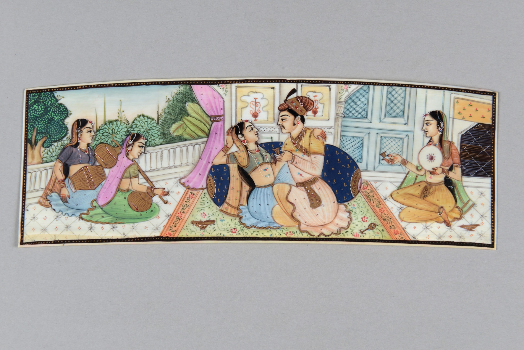 Obraz w kształcie wycinka koła obwiedziony podwójną ramką: białą oraz czarną w złote kropki. Przedstawia młodego mężczyznę zabawiającego się z dziewczętami na pałacowym tarasie. Centralnym punktem obrazu jest para spleciona w uścisku, wsparta o poduszkę i spoczywająca na seledynowym kwiecistym dywanie obwiedzionym jasno pomarańczową bordiurą dekorowaną kwiatami. Z prawej strony na marmurowej posadzce siedzi muzykantka z rodzajem tamburyna w lewej rece, prawą podaje młodej parze naczynko z wonnościami. Z lewej strony obrazka siedzą na podłodze muzykantki ze złotymi instrumentami muzycznymi.